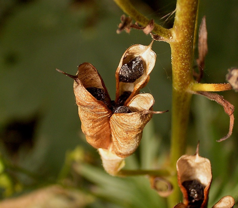 Aconitum napellus fruit